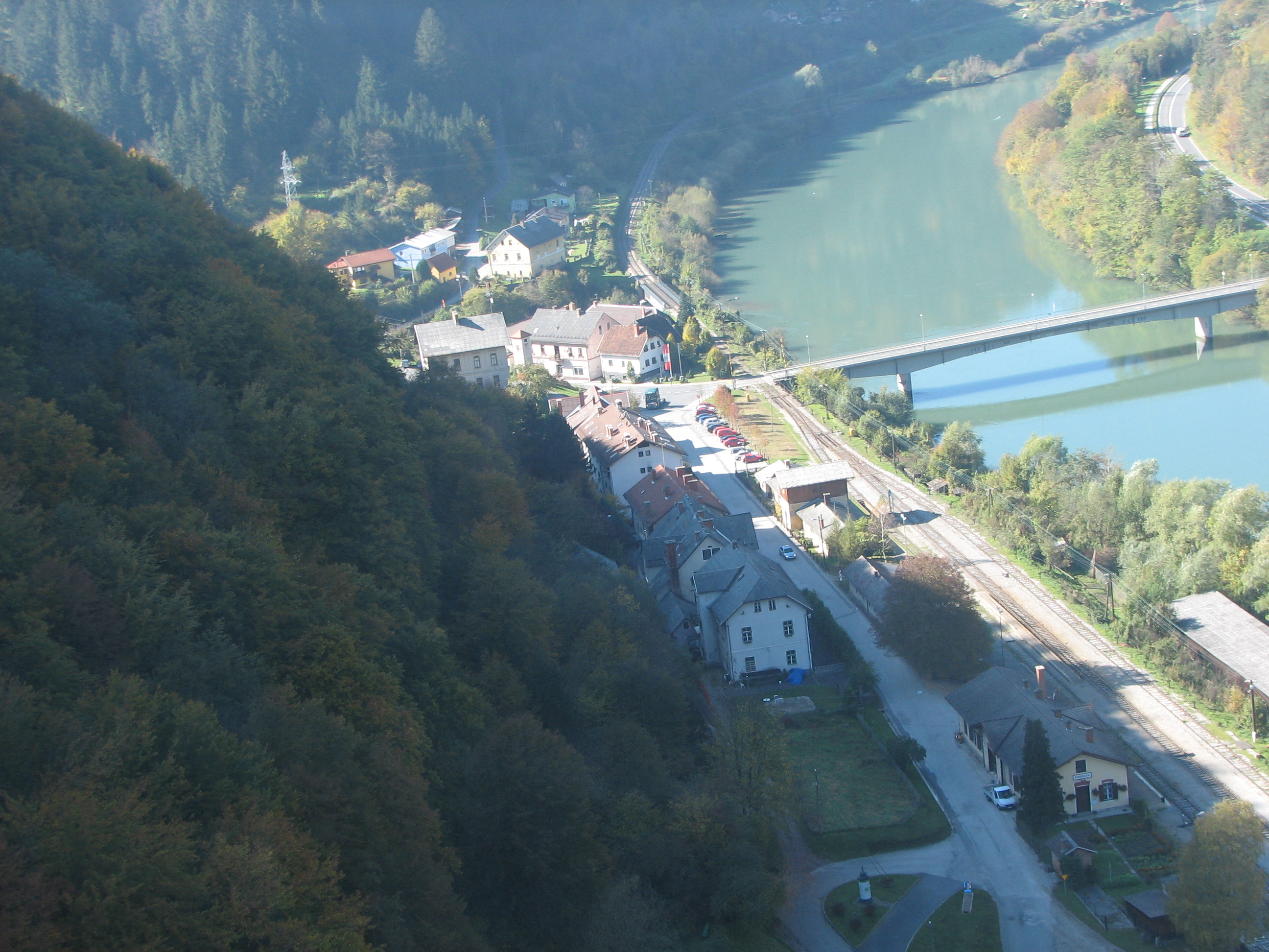 Center naselja Podvelka